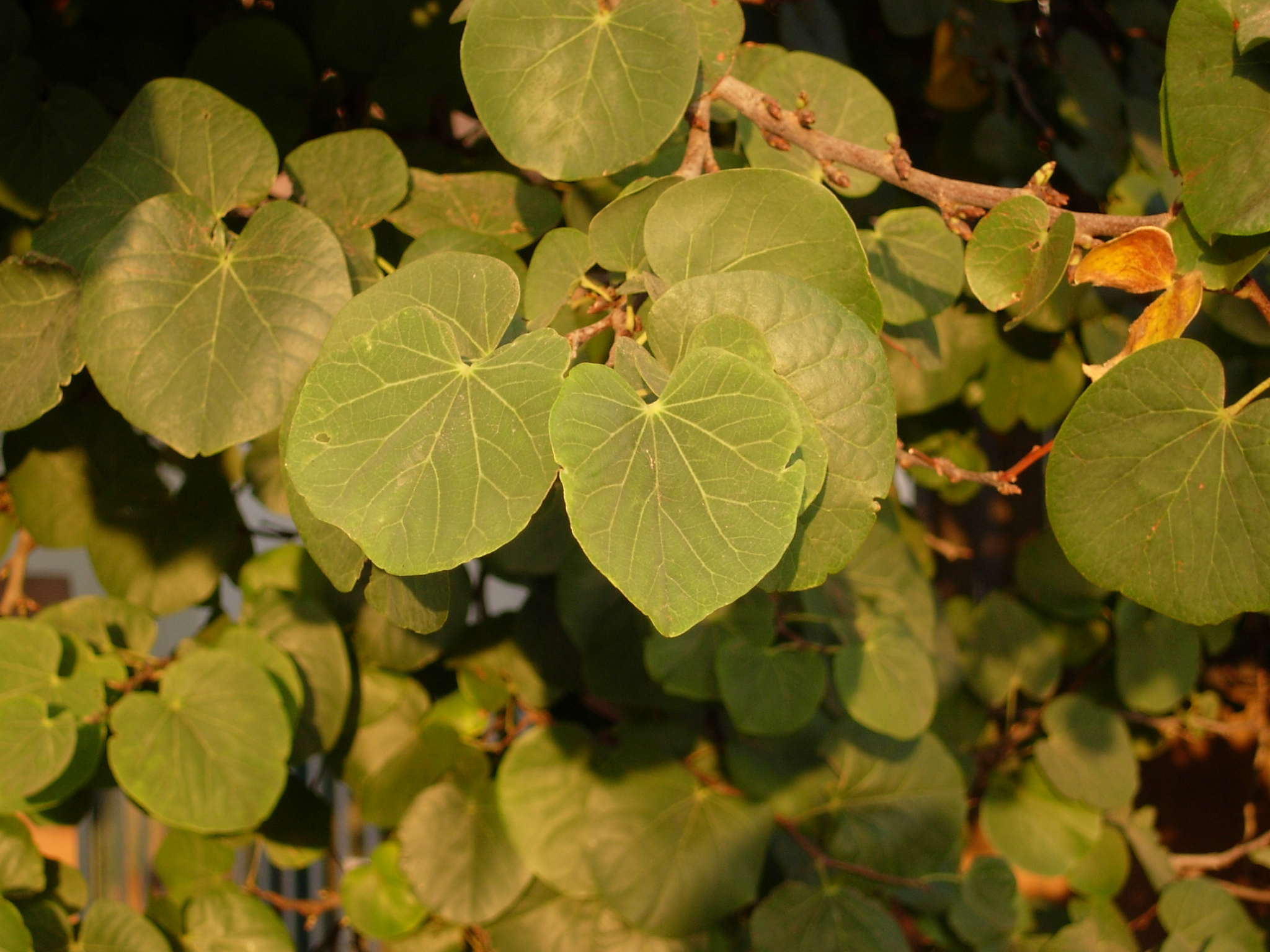 Foto scattata in Sardegna durante l'estate. Photo taken in Sardinia during summertime --Sirbone72 15:16, 23 December 2005 (UTC)